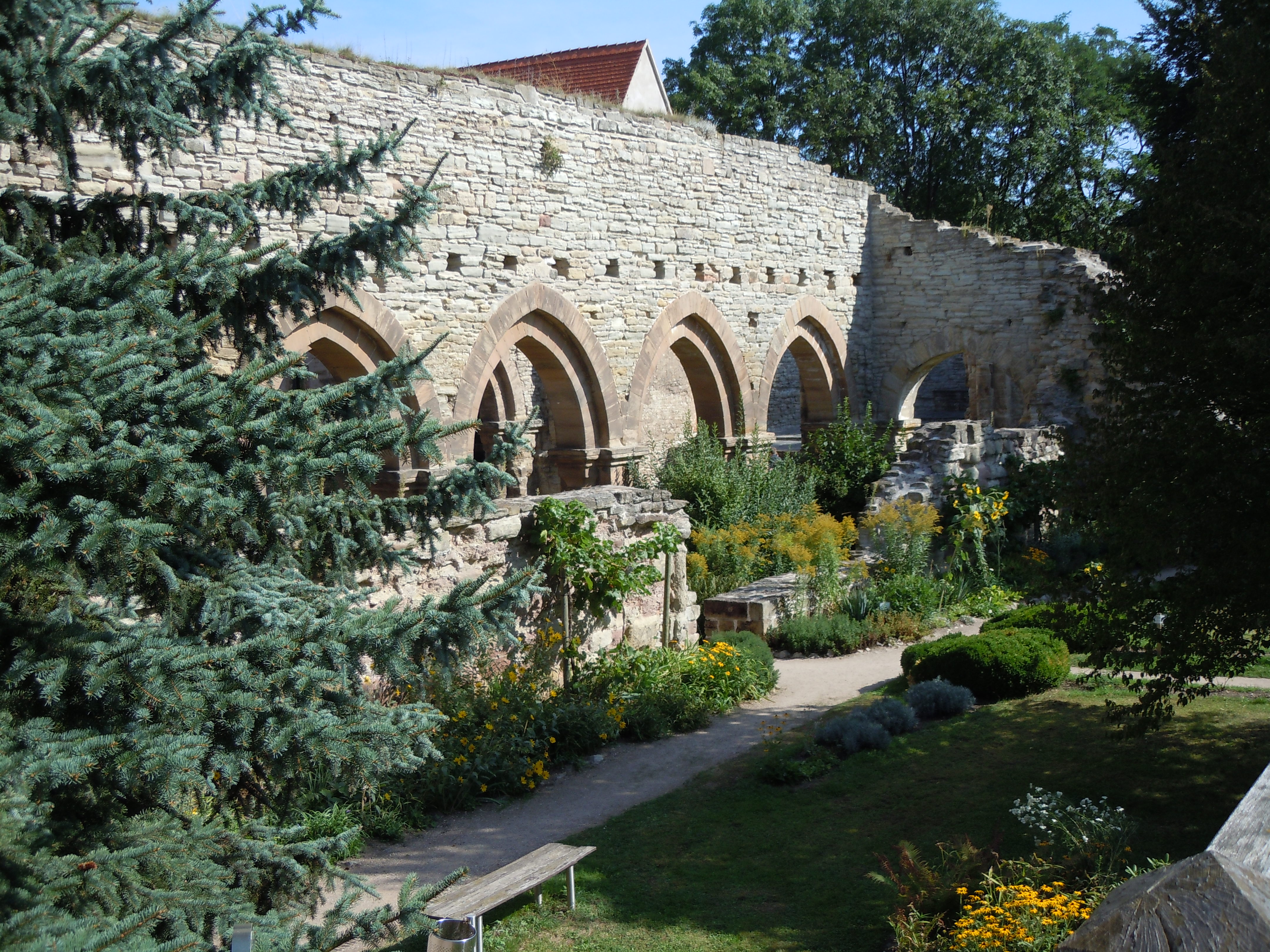 Memleben ist eine alte Kaiserpfalz der Ottonen, Sterbeort Heinrichs und Otto I.Die Marienkirche ist als Ruine erhalten.